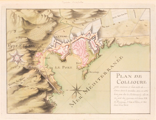 Plan de Collioure au 18e siècle